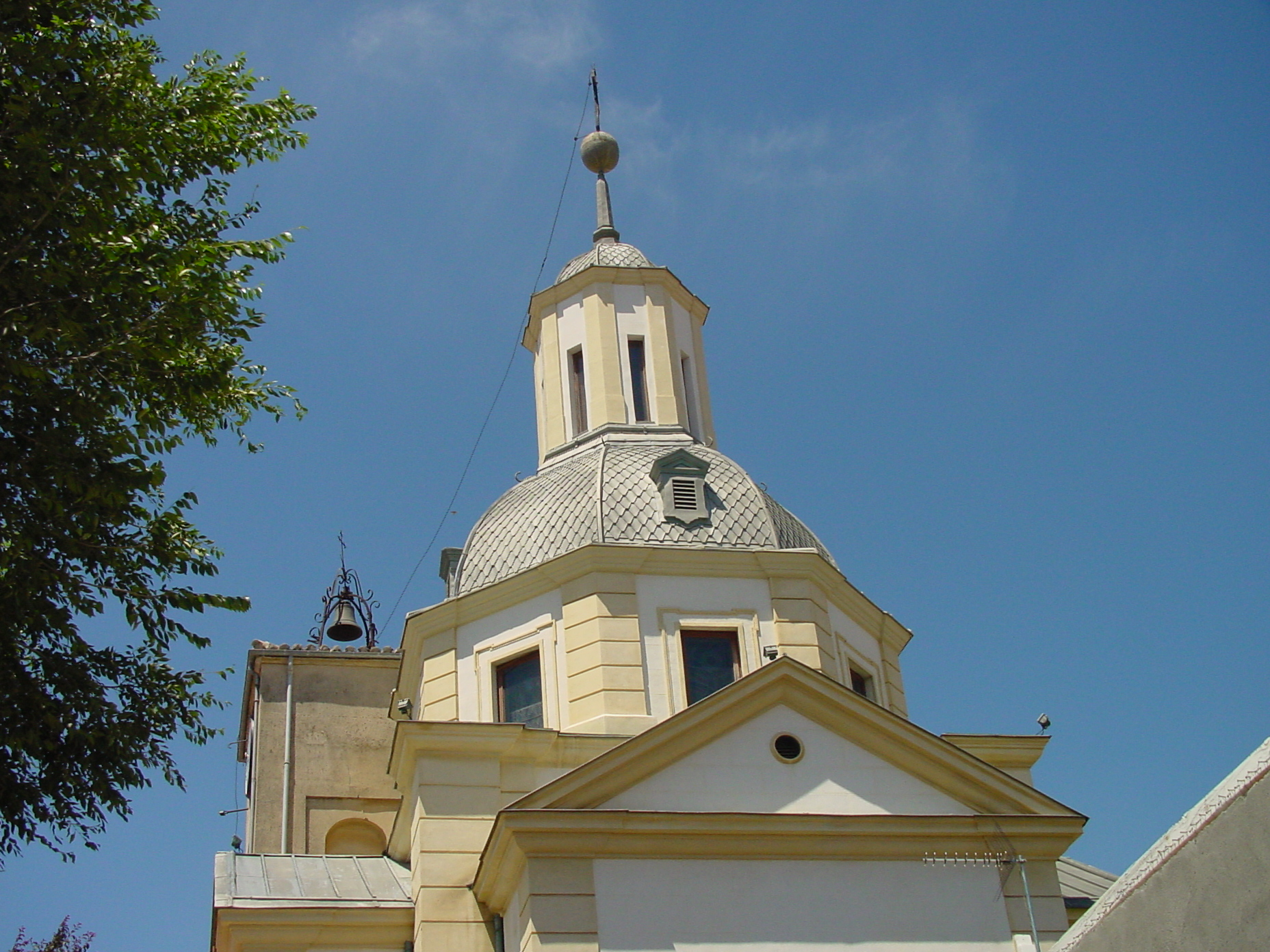 Iglesia en Mejorada del Campo.